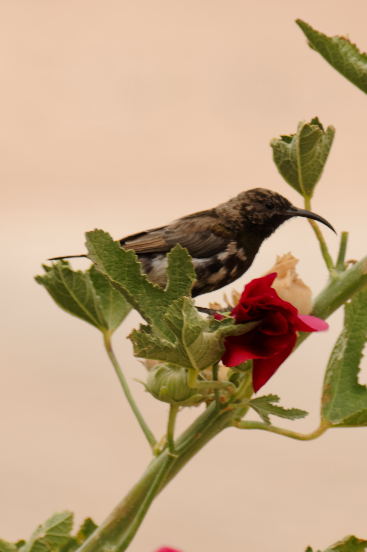 Un oiseau sur une rose trémière au Fish River Canyon.